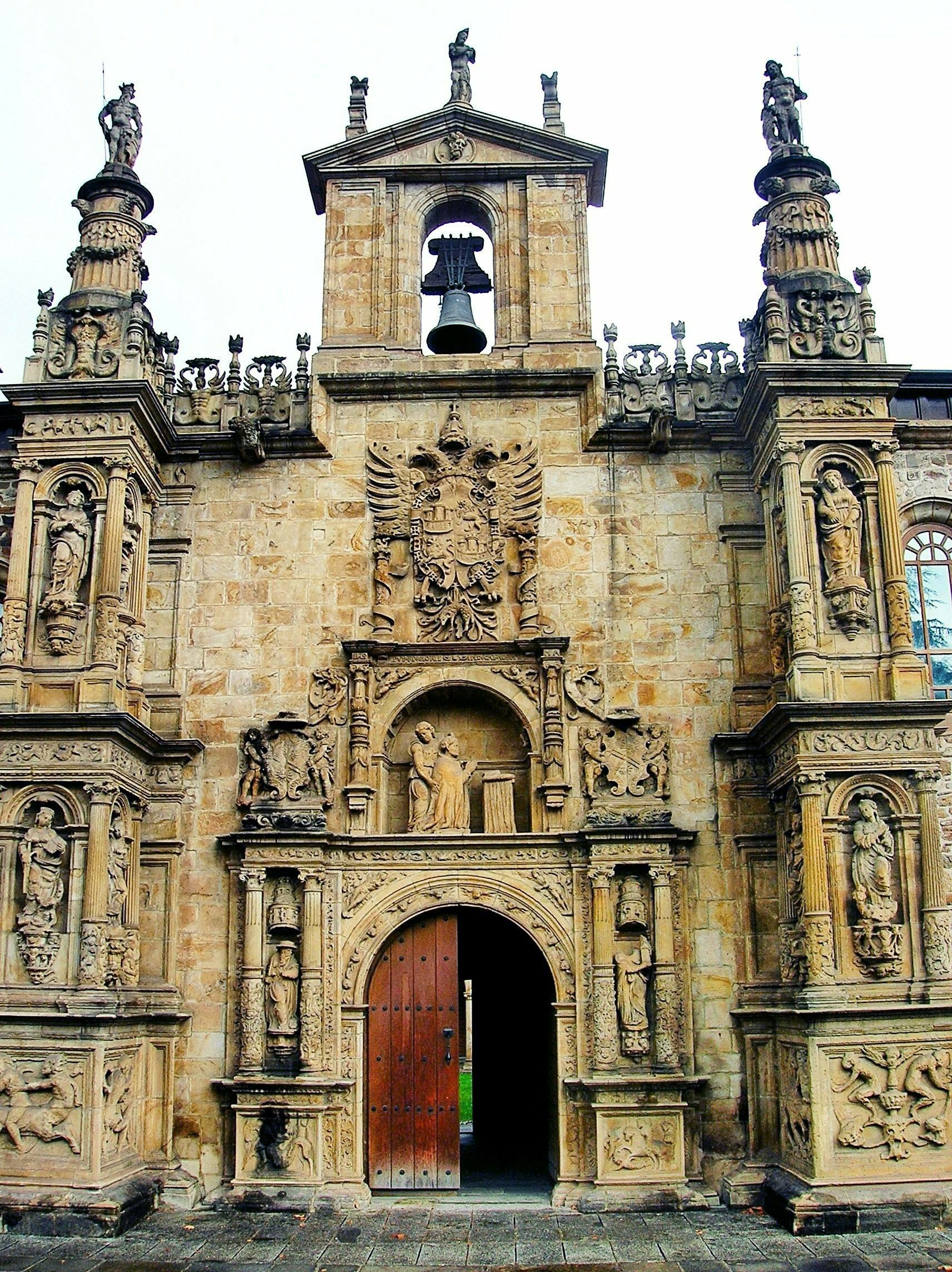 Universidad Sancti Spiritus, Oñate (Guipúzcoa)